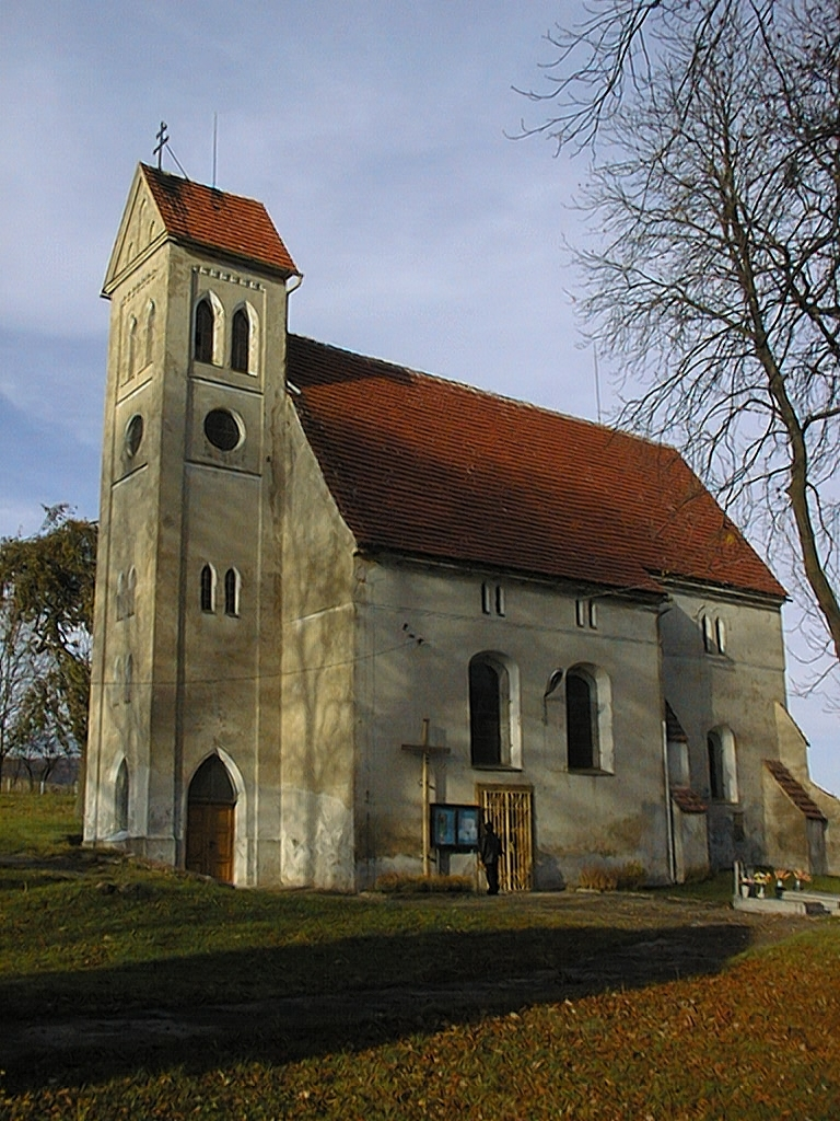 Jabłów kościół filialny pw. MB Częstochowskiej, późnogotycki z XVI w